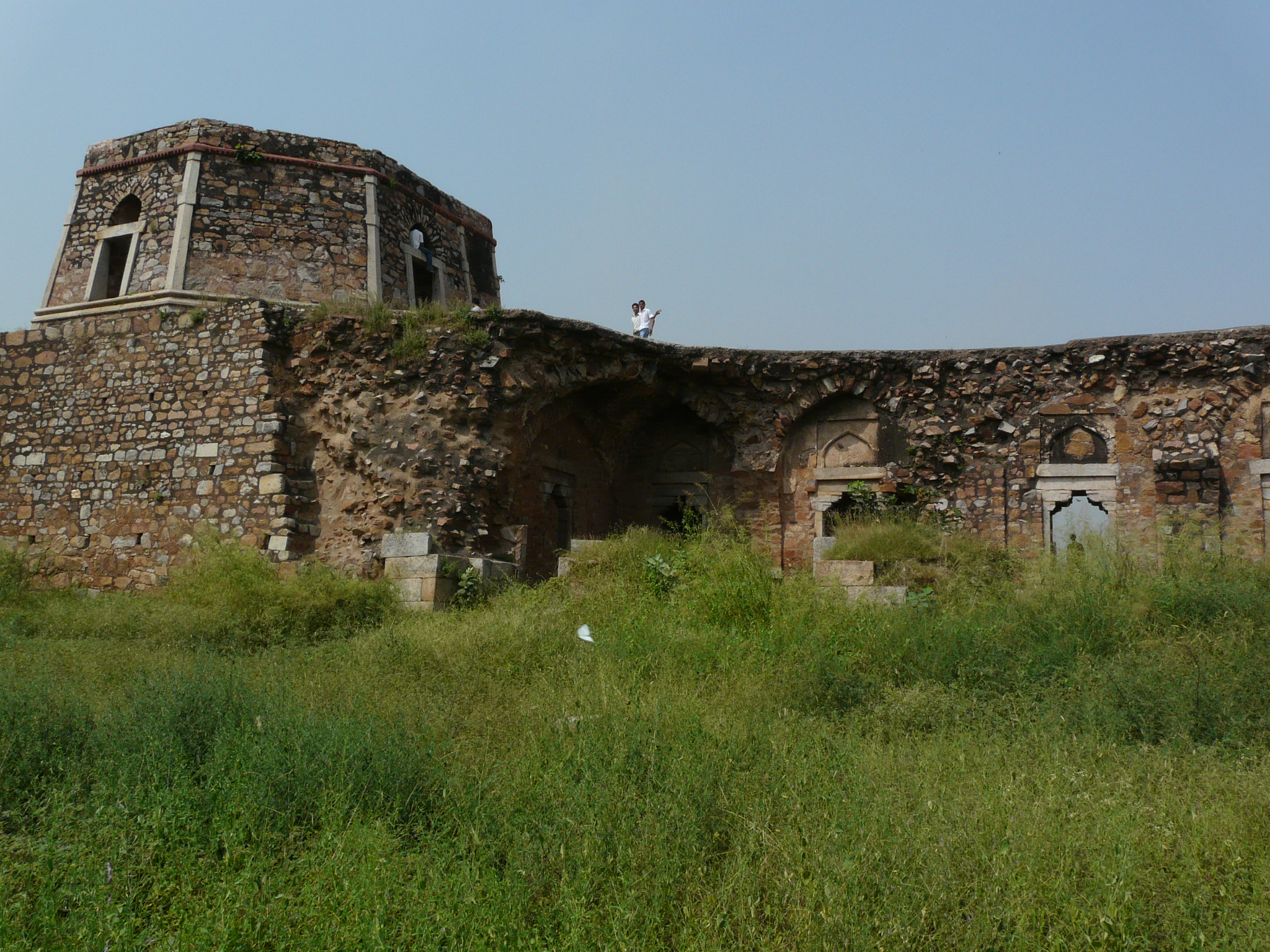 Руїни фортеці Джаханпанах.